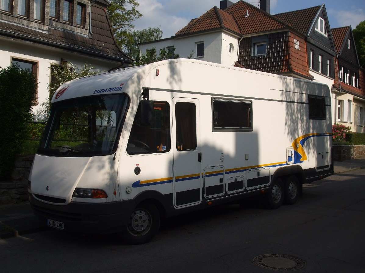 Euro Mobil Integra 690 HL-B Wohnwagen, Baujahr ~1984, 94 kW (128 PS), Dieselmotor, Fiat Ducato 2.8l JTD.